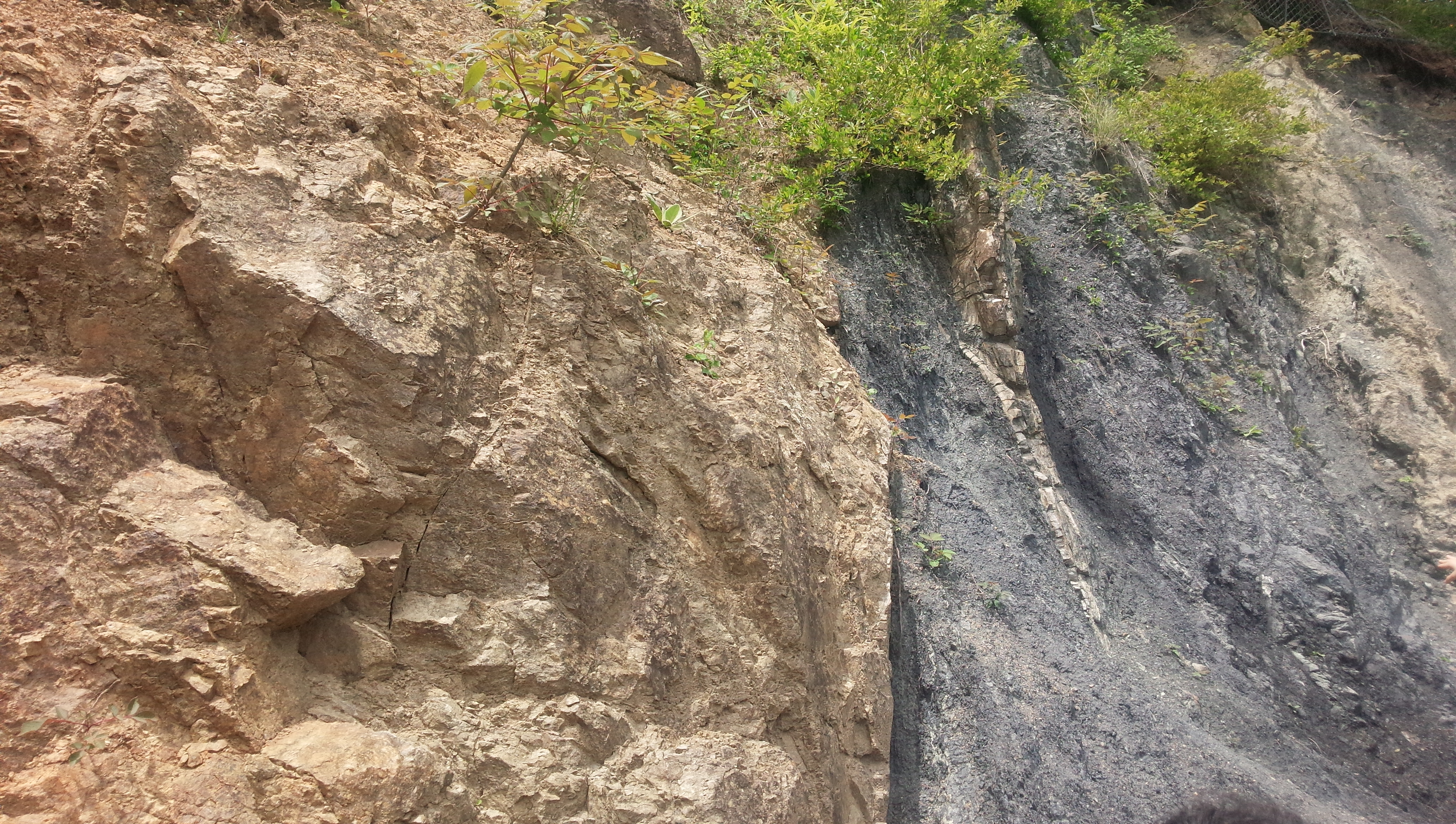 南アルプスジオパーク（中央構造線）エリア内伊那市長谷村にある溝口露頭